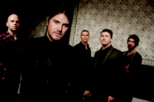 Die Band Stanfour